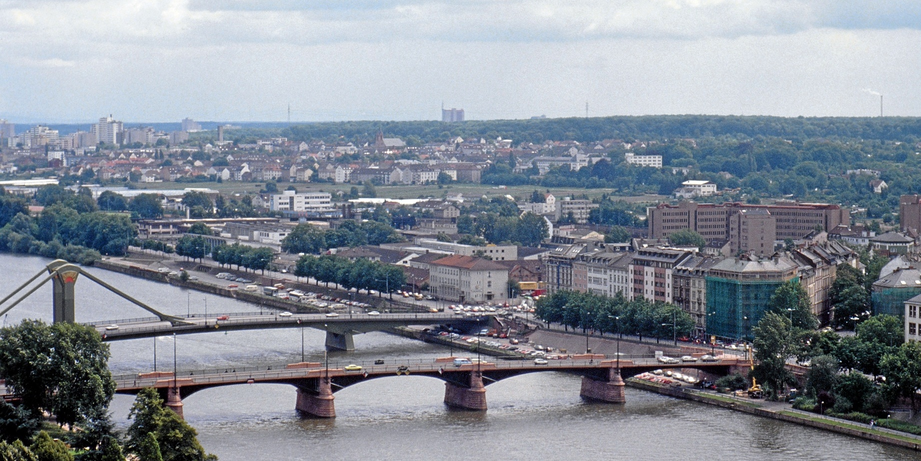 Das nordöstliche Frankfurt-Sachsenhausen mit dem Schlachthof im Jahr 1990. Blick vom Dom. Auf dem Gelände des Schlachthofs entstand später das Deutschherrnviertel. Im Vordergrund die Ignatz-Bubis-Brücke (damals: Obermainbrücke) und die Flößerbrücke. Im Hintergrund der Stadtteil Oberrad.